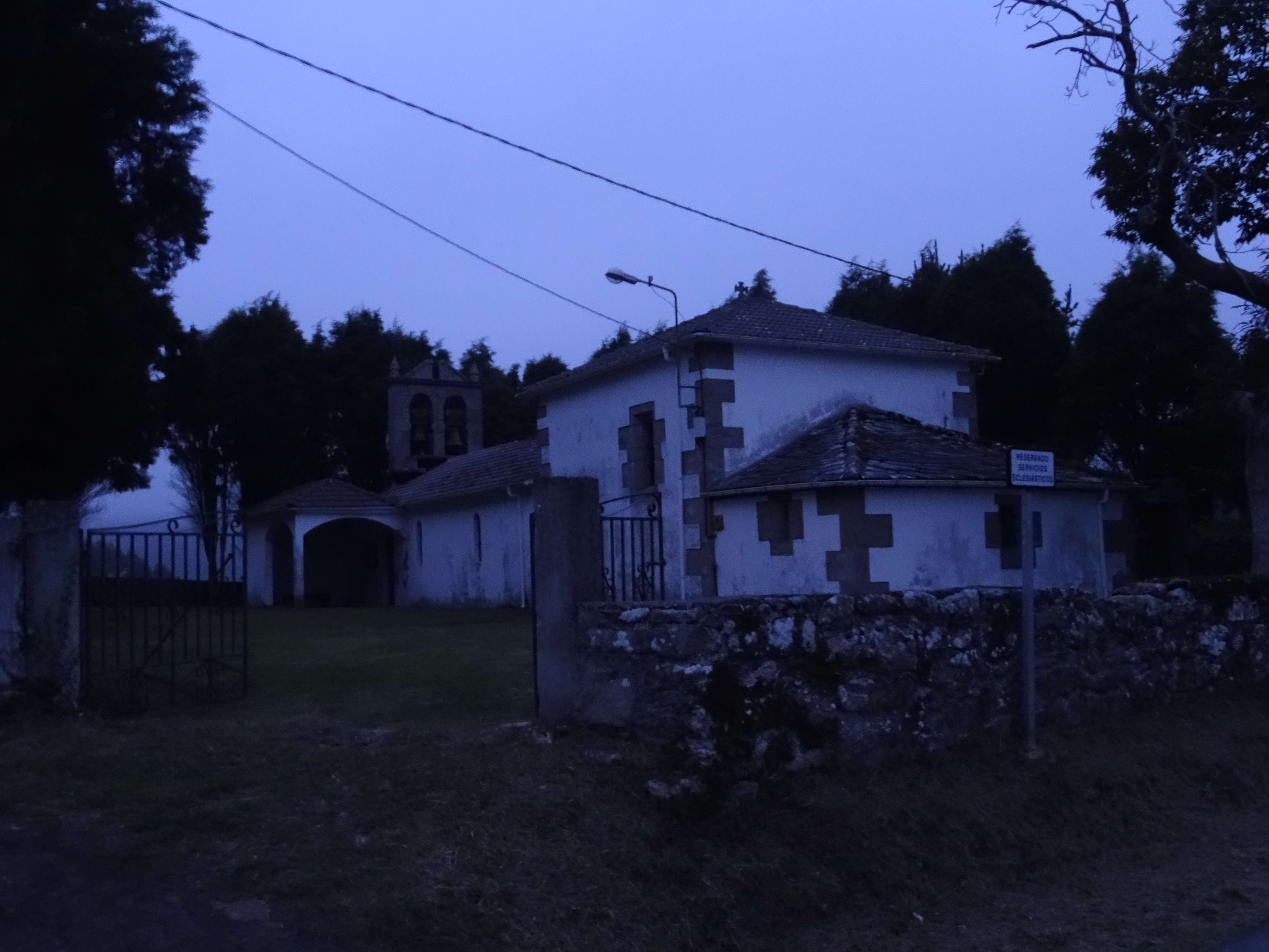 Ver título.